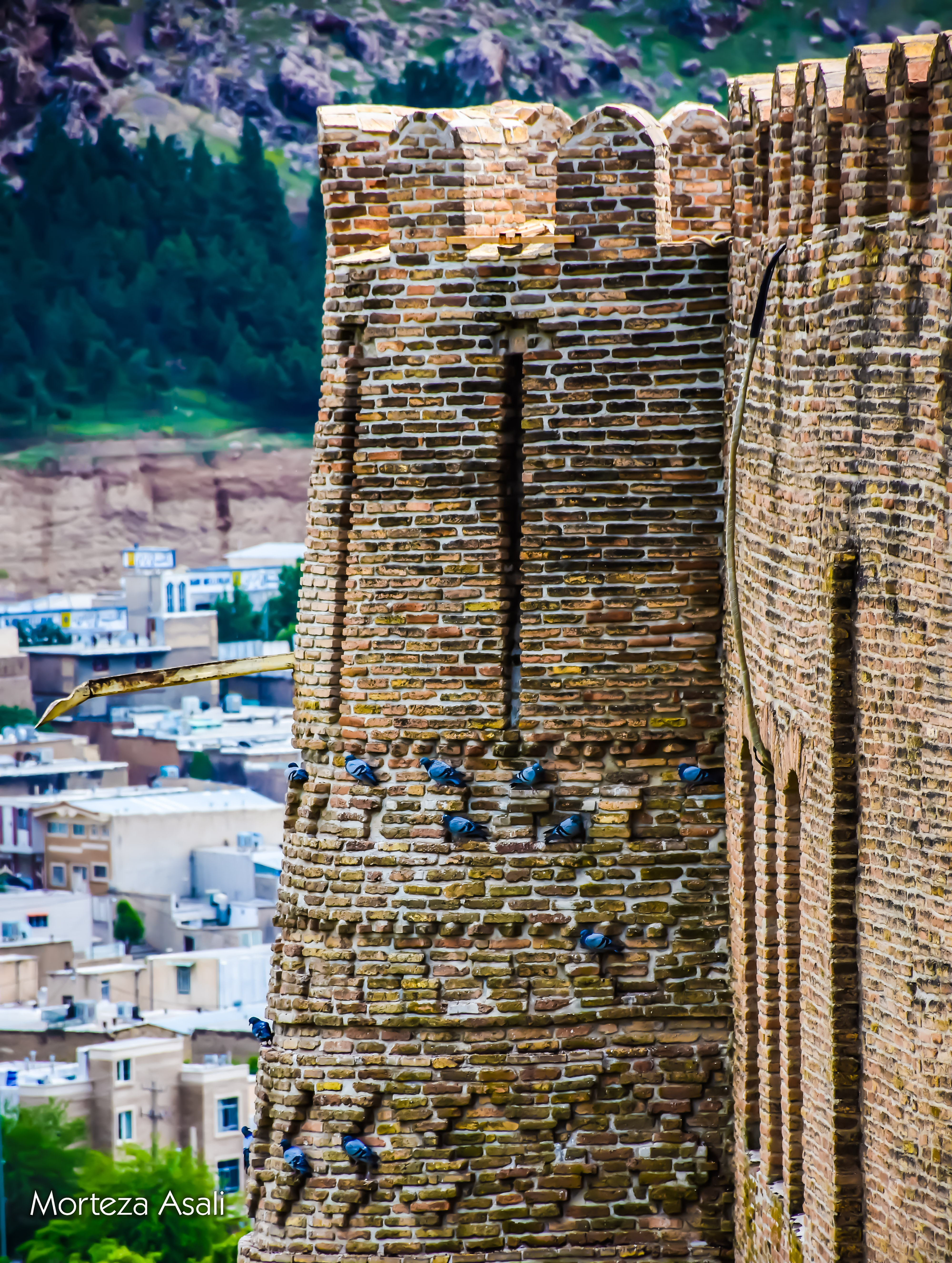 فلک‌الافلاک